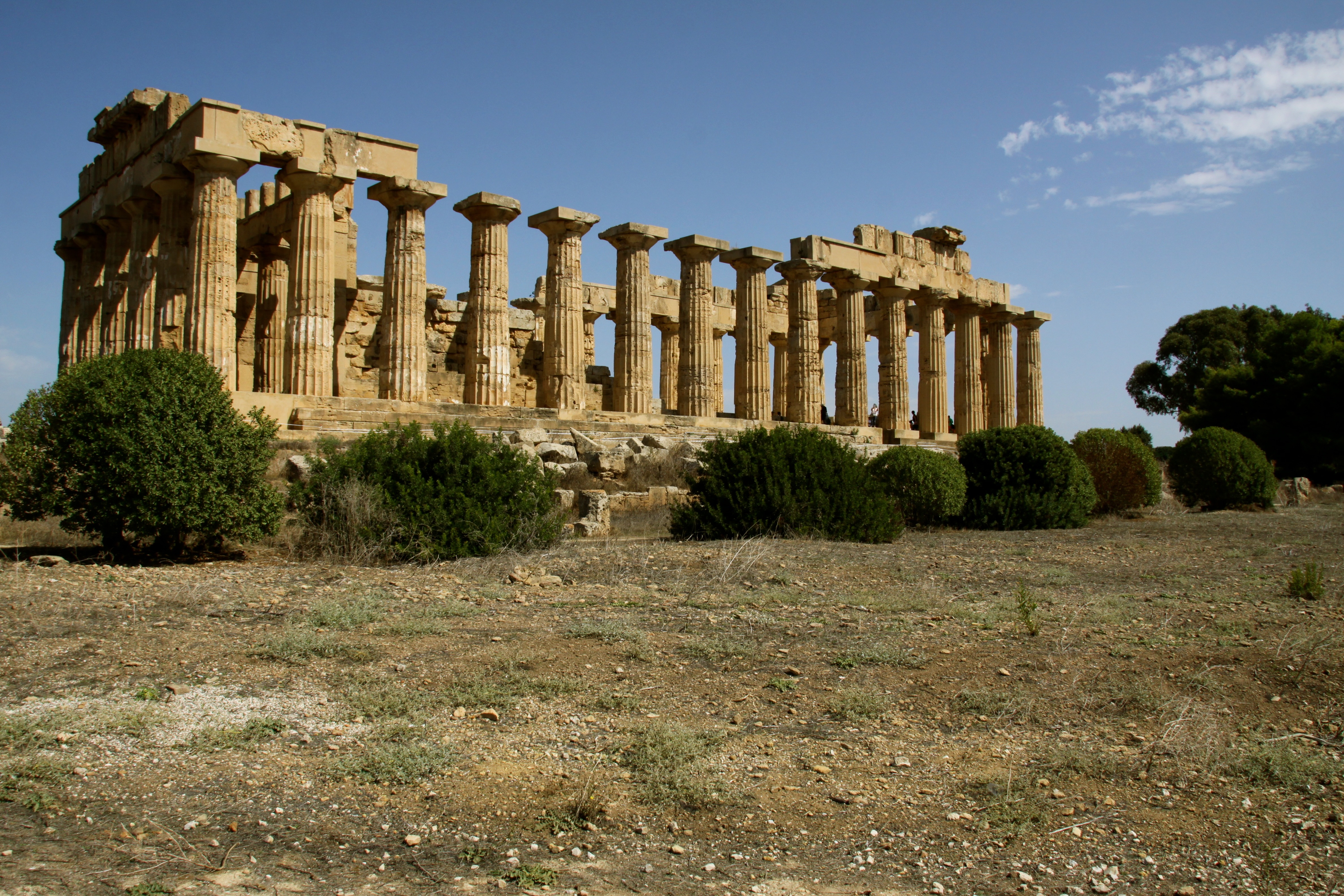 Temple E (Selinunte)